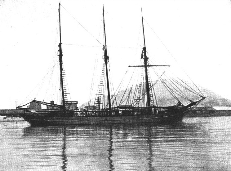 El barco de Brabo, el futuro Monte Protegido